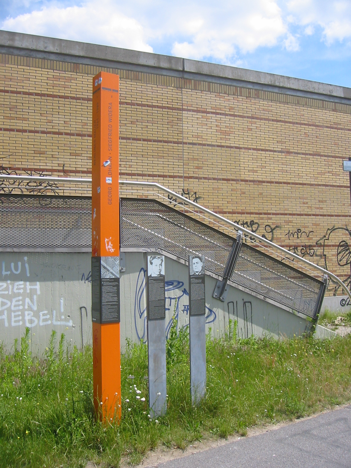 Gedenkstele für Georg Feldhahn und Siegfried Widera, Todesopfer an der Berliner Mauer. Die Stele befindet sich in der Nähe des Unglücksortes an der Massantebrücke in Berlin-Baumschulenweg am Berliner Mauerweg.